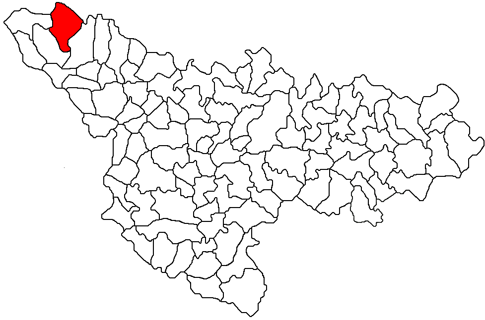 Harta judetului Timis; evidentiata comuna Cenad Licensing Categorie:Hărţi ale judeţului Timiş